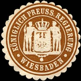 Sealing stamp Title: Königlich Preussische Regierung - Wiesbaden Description: braun, weiß, geprägt Place: Wiesbaden size: 4 cm